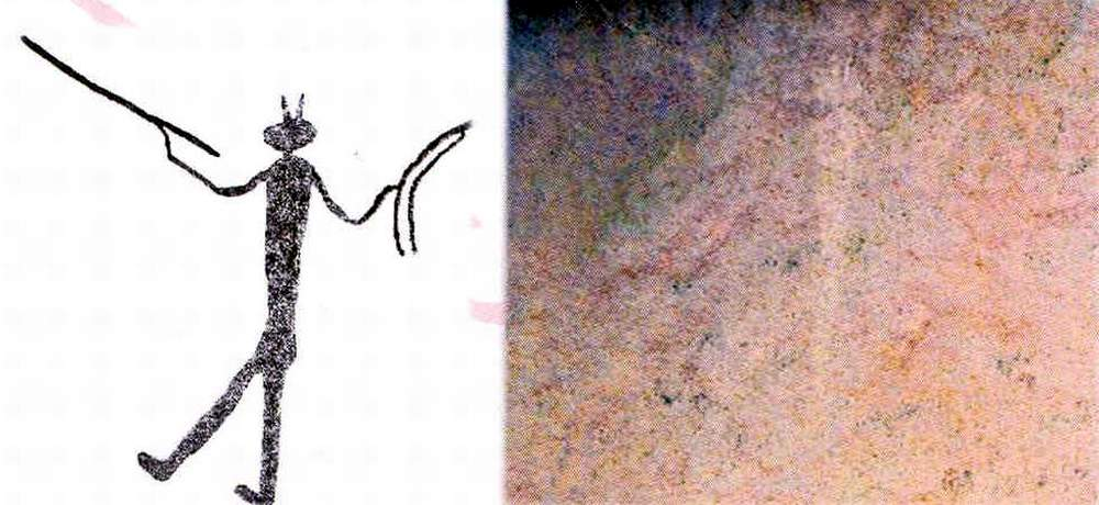 Detalle de panel decorado (antropomorfo emplumado) en el Abrigo de la Hoya de los Navarejos II en el Rodeno de Tormón (Teruel), Parque Cultural de Albarracín [Tomado de la Guía Didáctica: calco y natural] (2018).